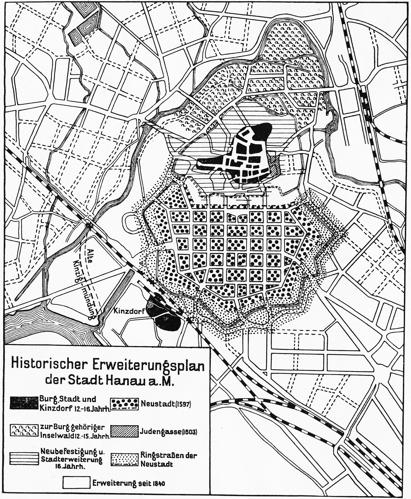 Übersichtskarte zur Erweiterung der Städte Hanau